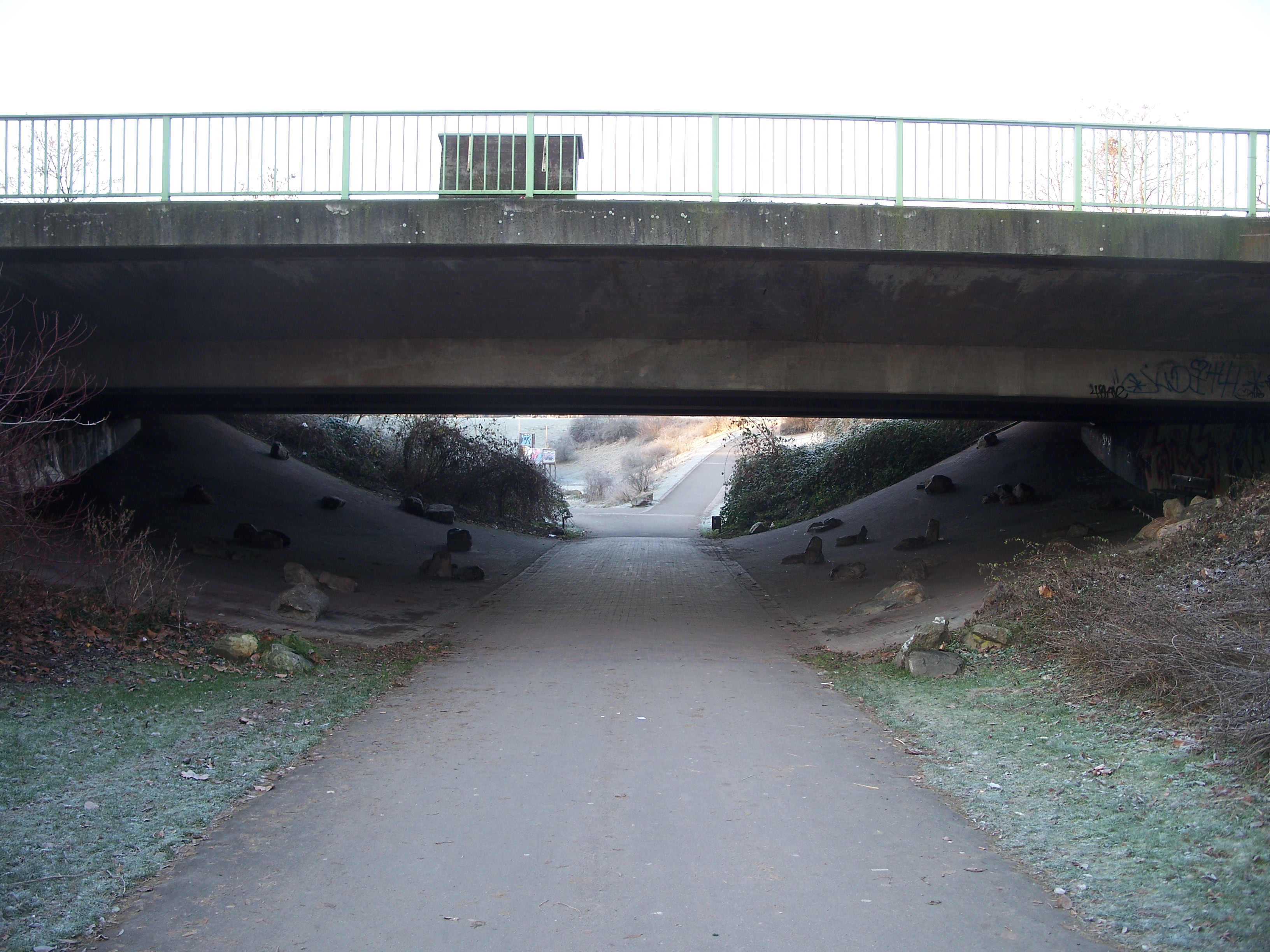 überbreite Fußgängerunterführung unter der Neusserstr.